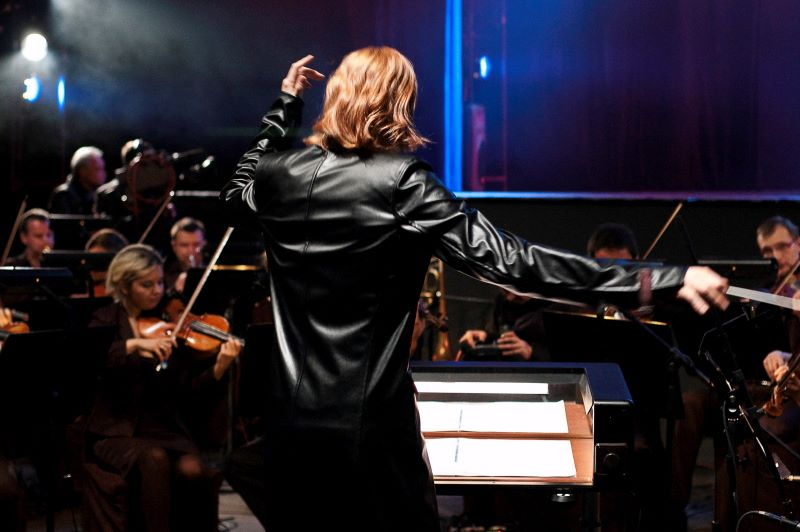 Łukasz Górewicz i Baltic Neopolis Orchestra podczas projektu "Dzieci Przełomu".